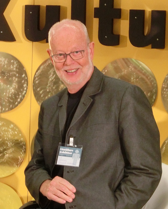 Förre ärkebiskopen K. G. Hammar på Bok- och Biblioteksmässan 2013 i Göteborg, Sverige.